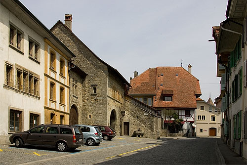 Estavayer-le-Lac: Rue du Musée et la Maison de la Dîme